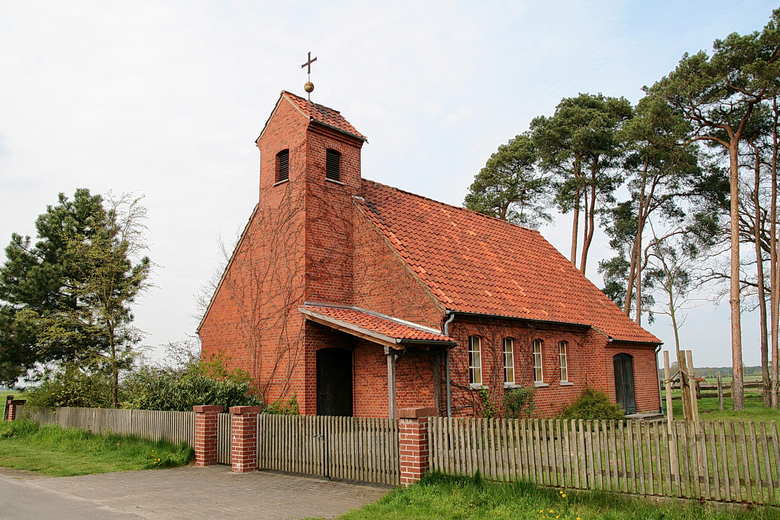 Kapelle von 1959 in Meitze (Wedemark), Niedersachsen, Deutschland